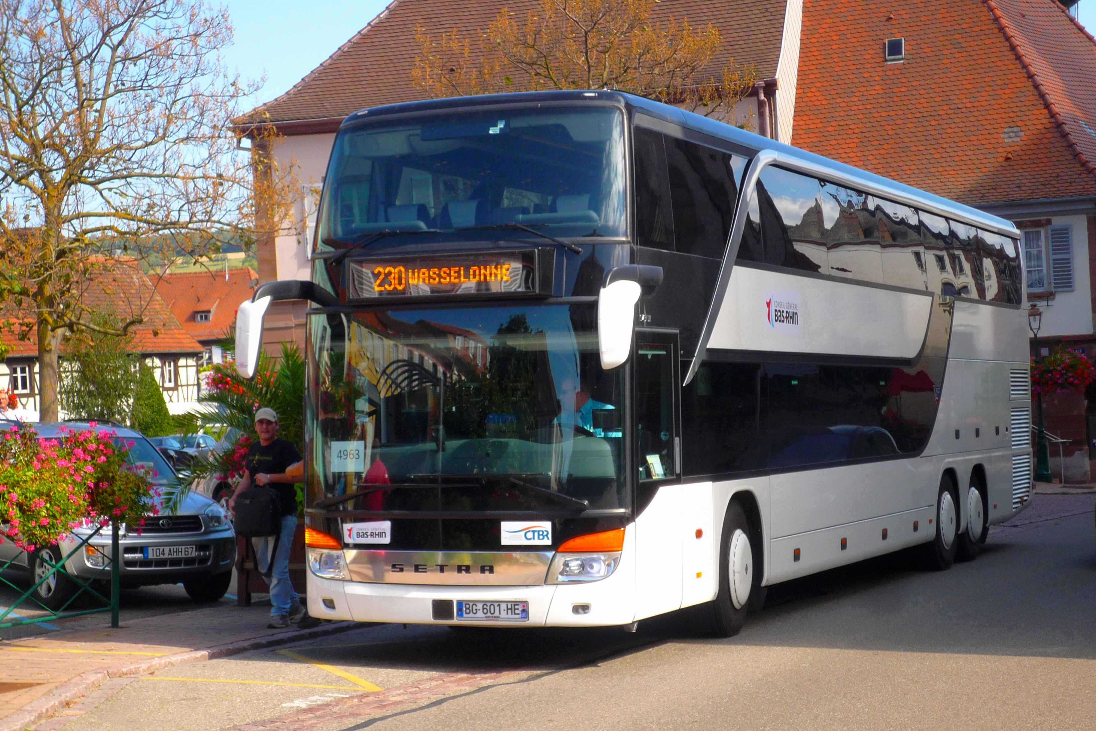 Wasselonne, CTBR ligne 230, car Setra S 431 DT, essai TSPO sept 2011